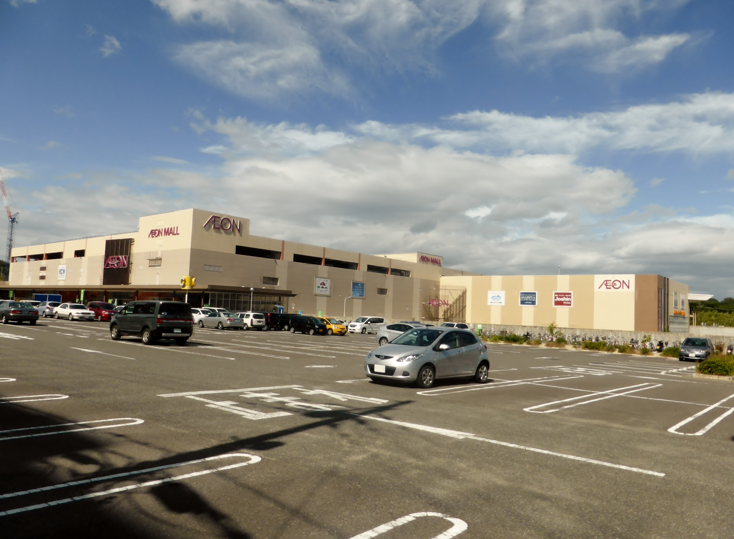 イオンモール奈良登美ヶ丘を撮影